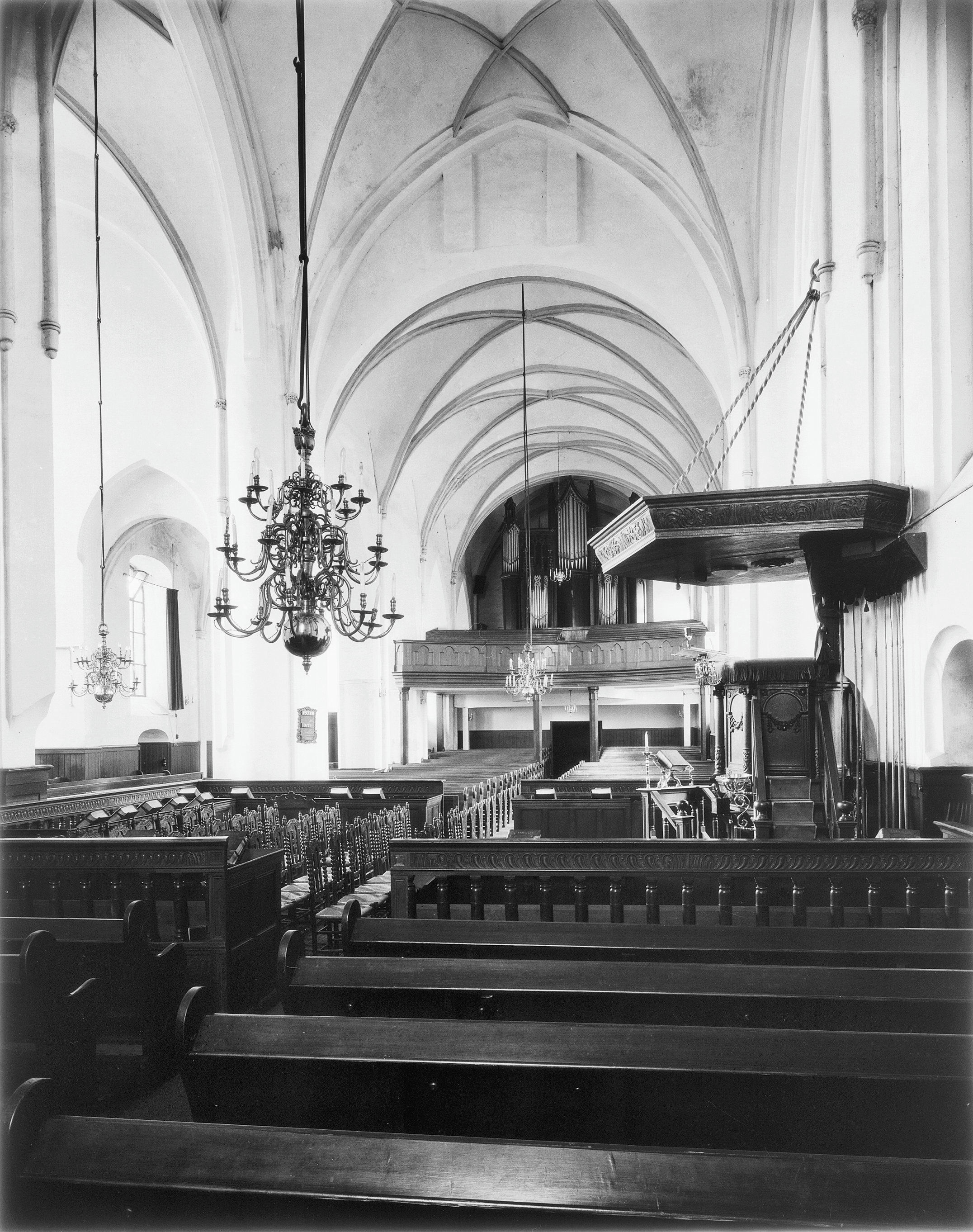 N.H.Kerk: interieur naar het westen